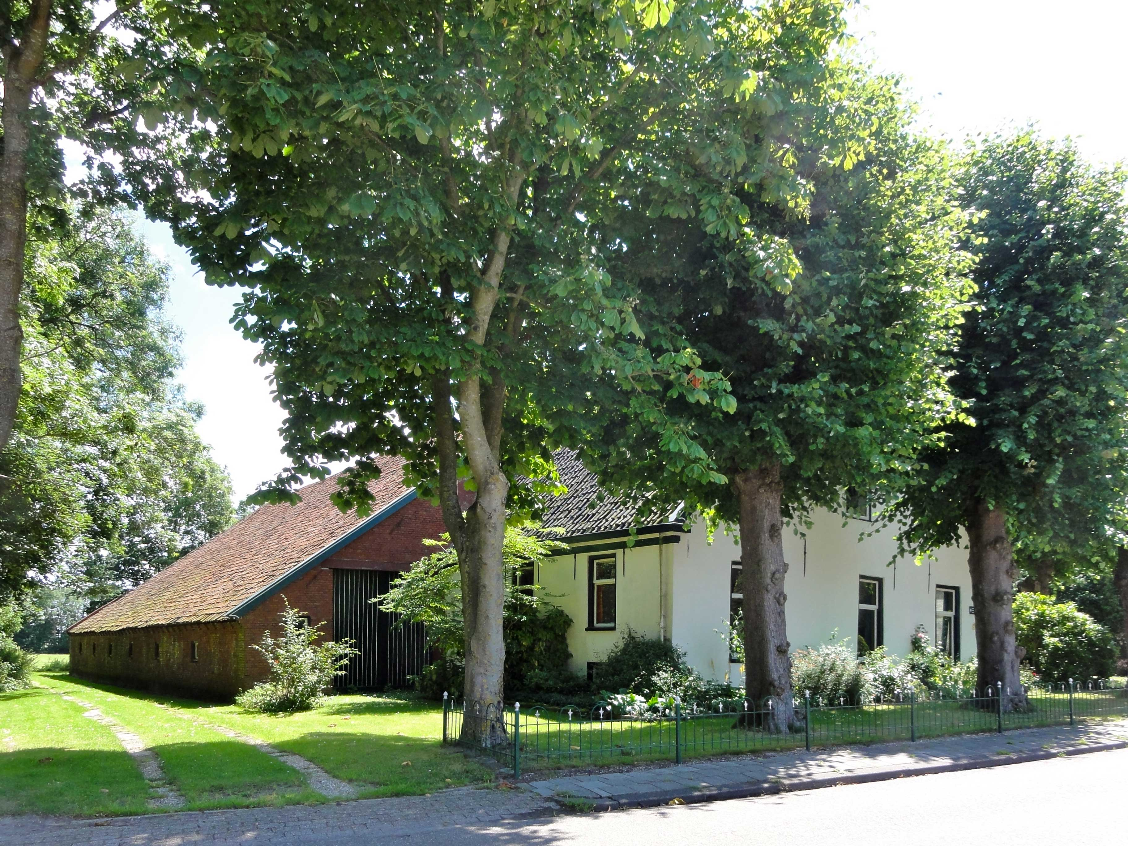 Oldambtster boerderij Noorderstraat 4 Noordbroek